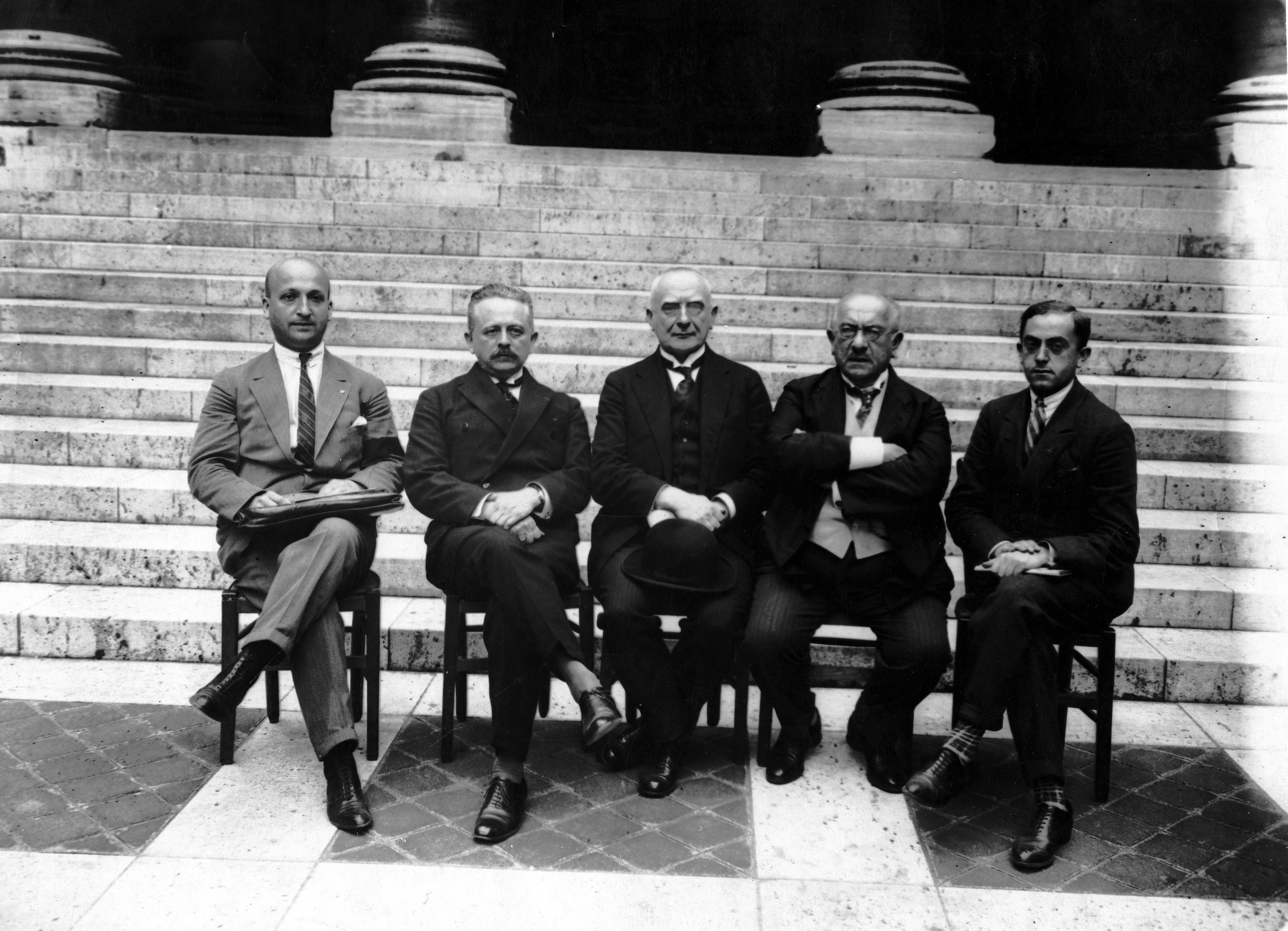 Członkowie delegacji na XXIV Kongres Pokoju. Od prawej do lewej: Salomon Kornfeld ps. Grenkamp, przewodniczący delegacji dr Polak, adwokat Wacław Łypacewicz, Marceli Handelsman, Edward Wiesenfeld.